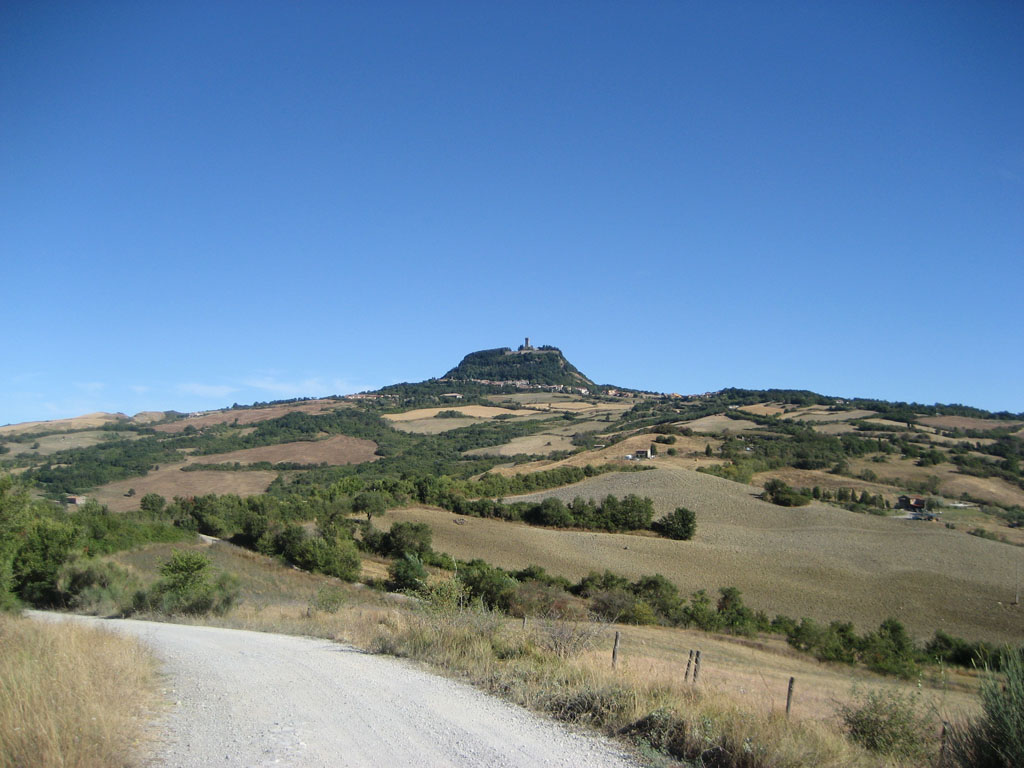 far view picture of city Radicofani/Italy